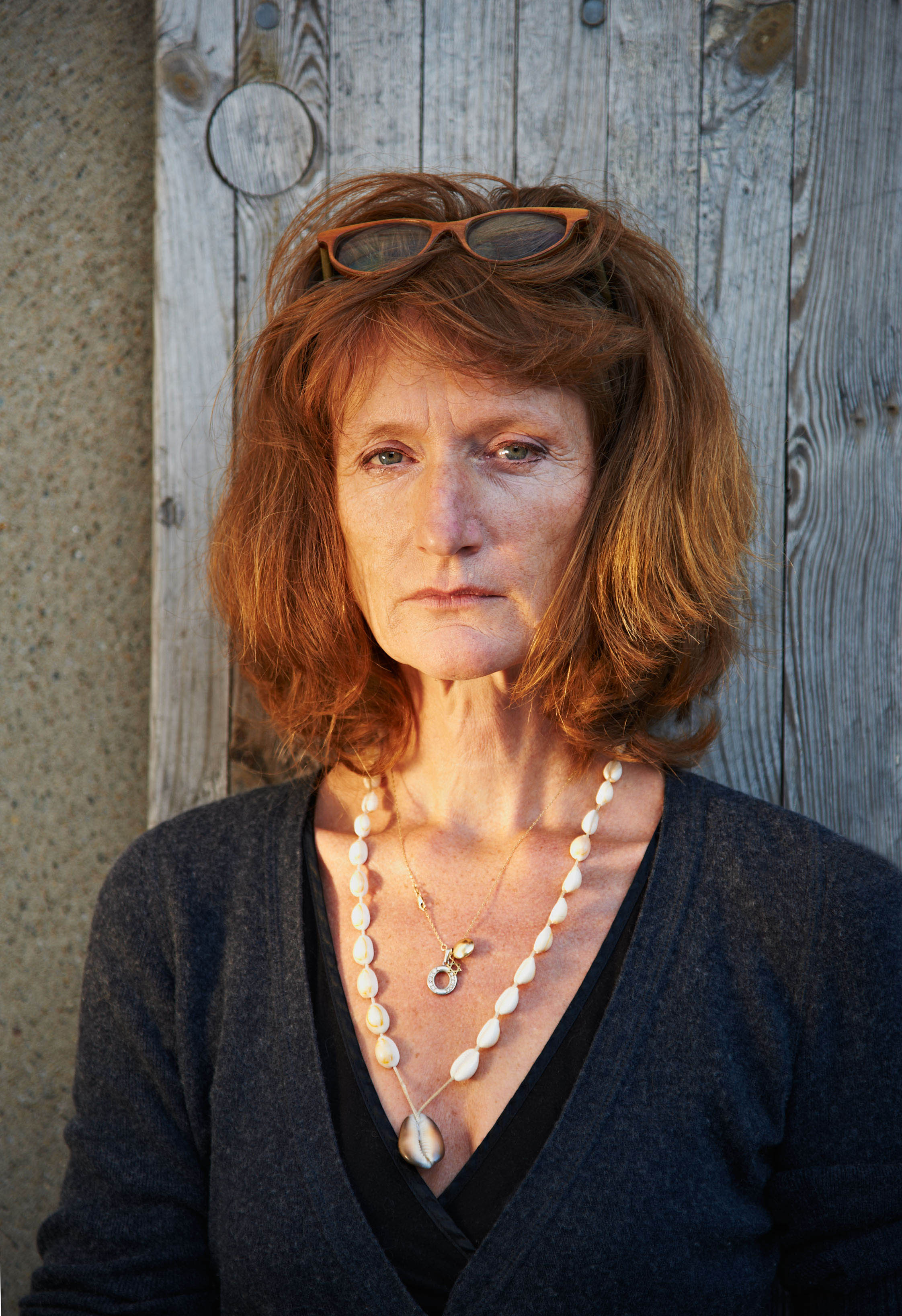 Porträt der deutschen Fotografin Katharina Mayer.